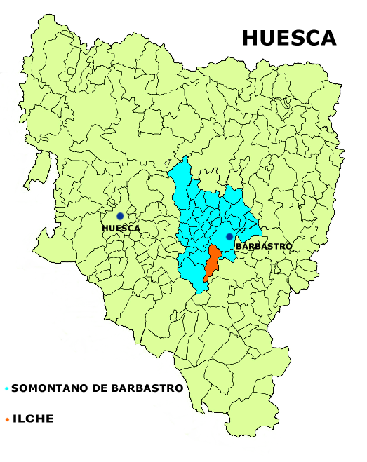 Mapa del municipio de Ilche Creado el 06.10.2006 por Dionisio en base a Image:Aragon municipalities.png